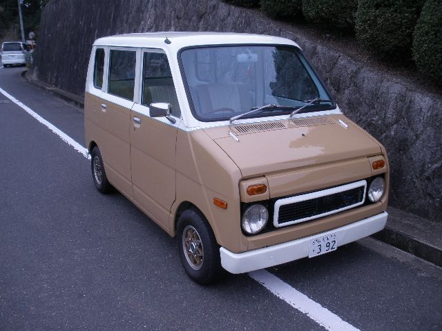 ホンダ ステップバン